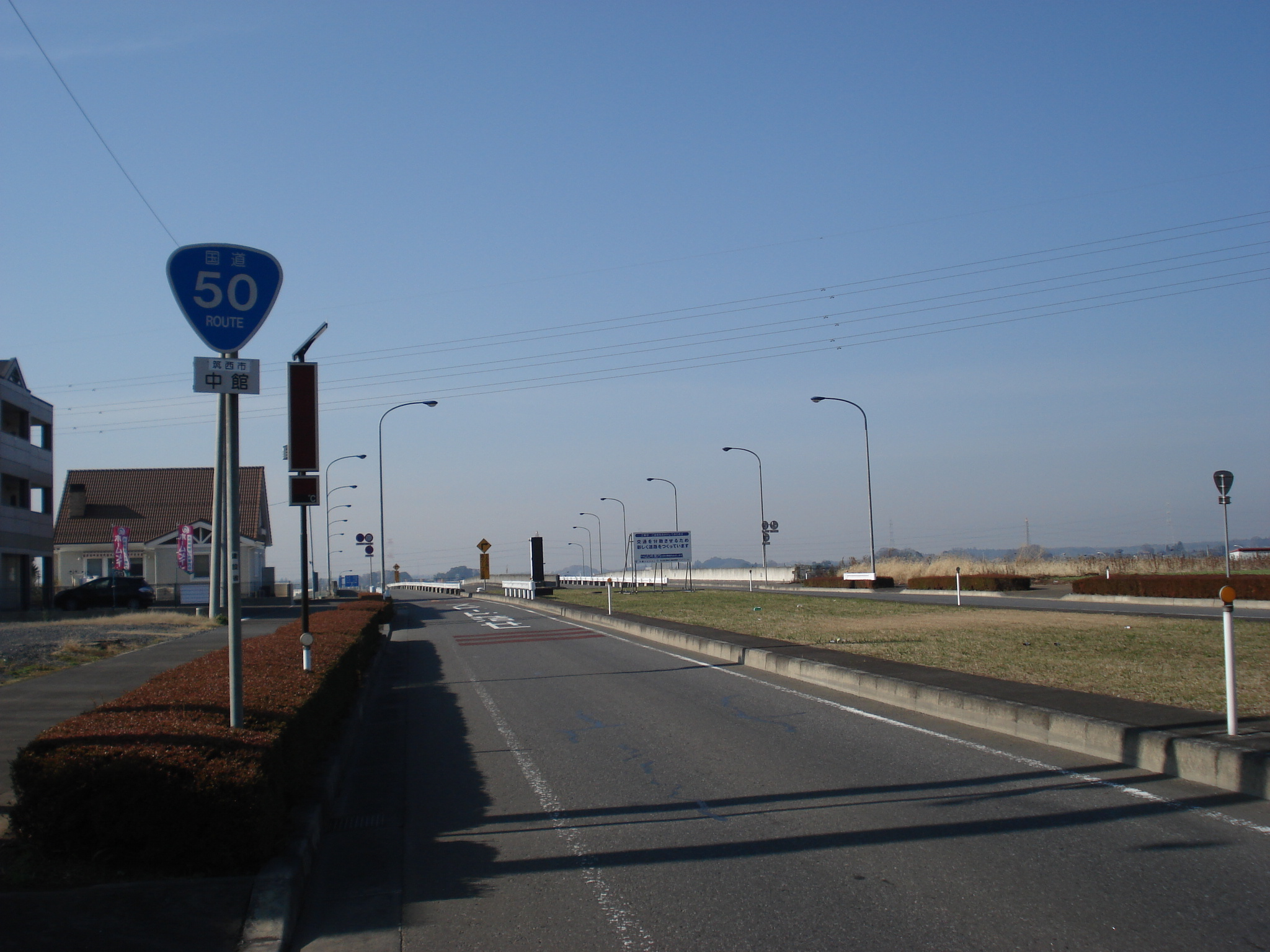 国道50号下館バイパス 茨城県筑西市中館